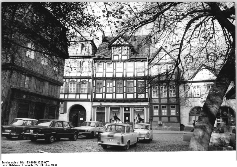 Bez. Halle, Der Kornmarkt von Quedlinburg ADN-ZB Gahlbeck 29.10.86 Bez. Halle: Der Kornmarkt von Quedlinburg gehört zum mittelalterlichen Stadtkern, der seit 1962 unter Denkmalschutz steht. Die Altstadt wurde Mitte des 12. Jahrhunderts gegründet. (siehe 8N)